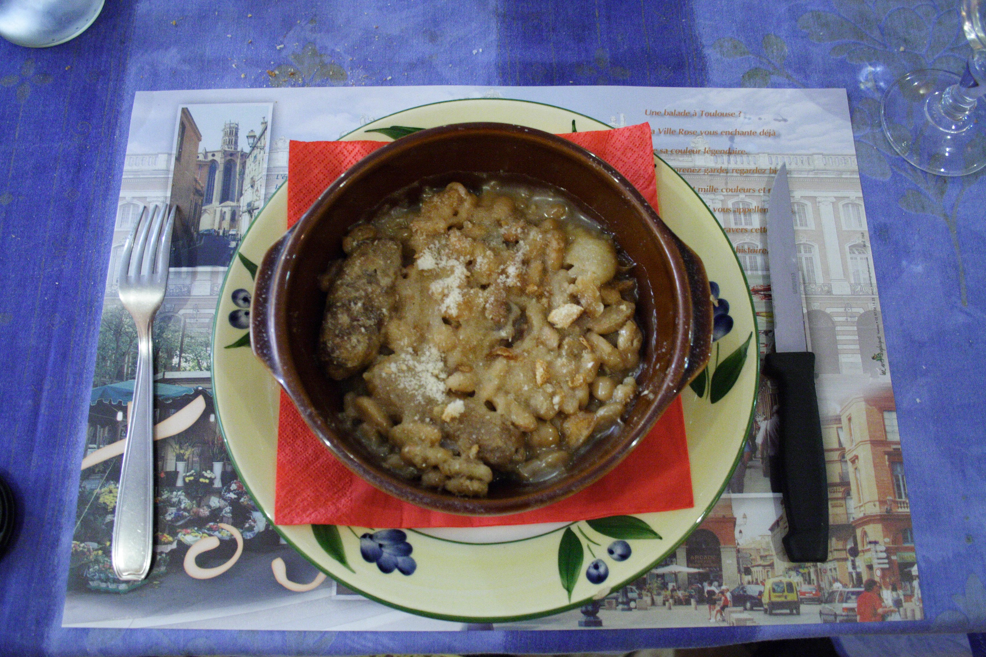 Cassoulet(Toulouse, France)